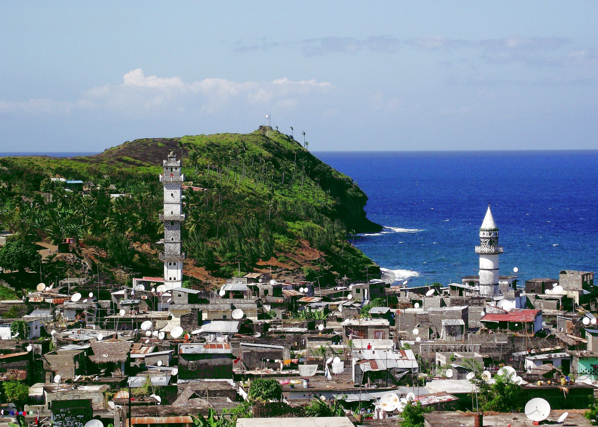 Vue partielle de la ville